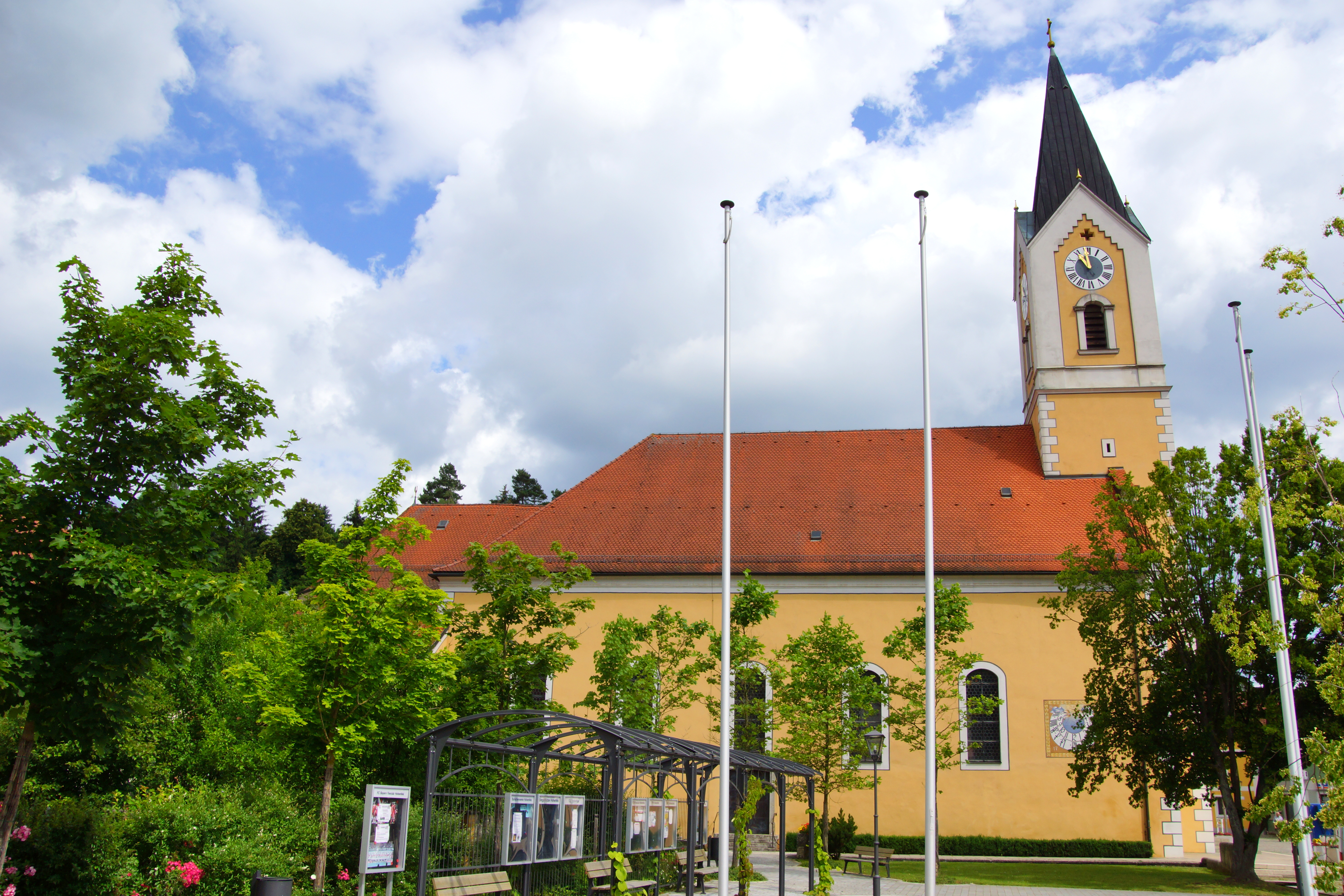 Die katholische Pfarrkirche St. Ulrich im Oberpfälzischen Markt Hohenfels